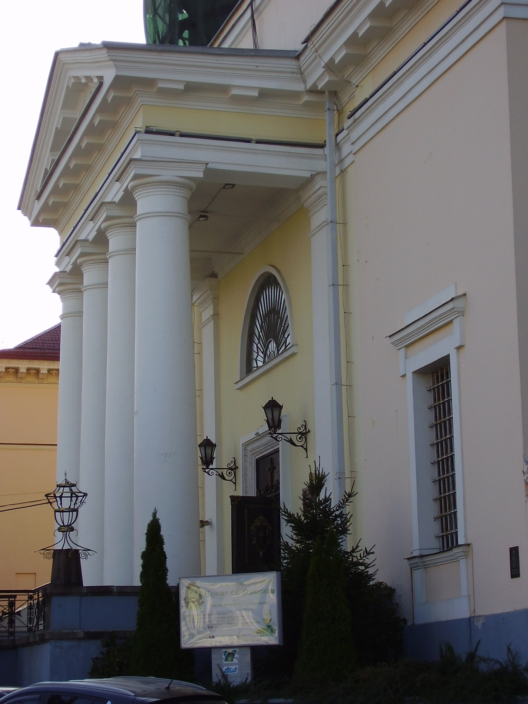 Костьол Святого Олександра, Київ, Костьольна вул., 17